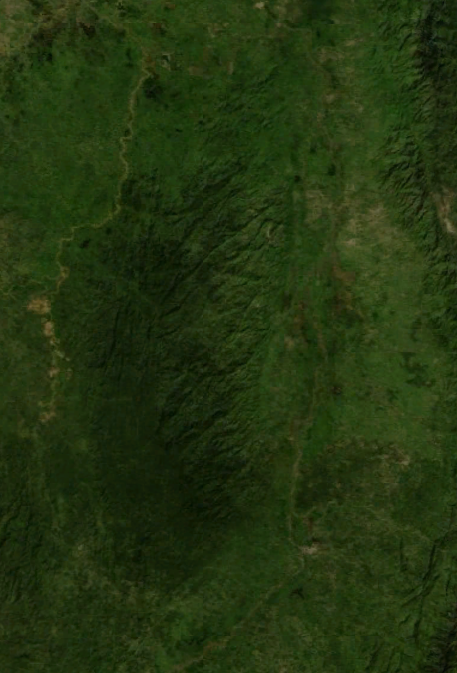 Vista satelital de la serranía de San Lucas extraida de NASA World Wind 1.4